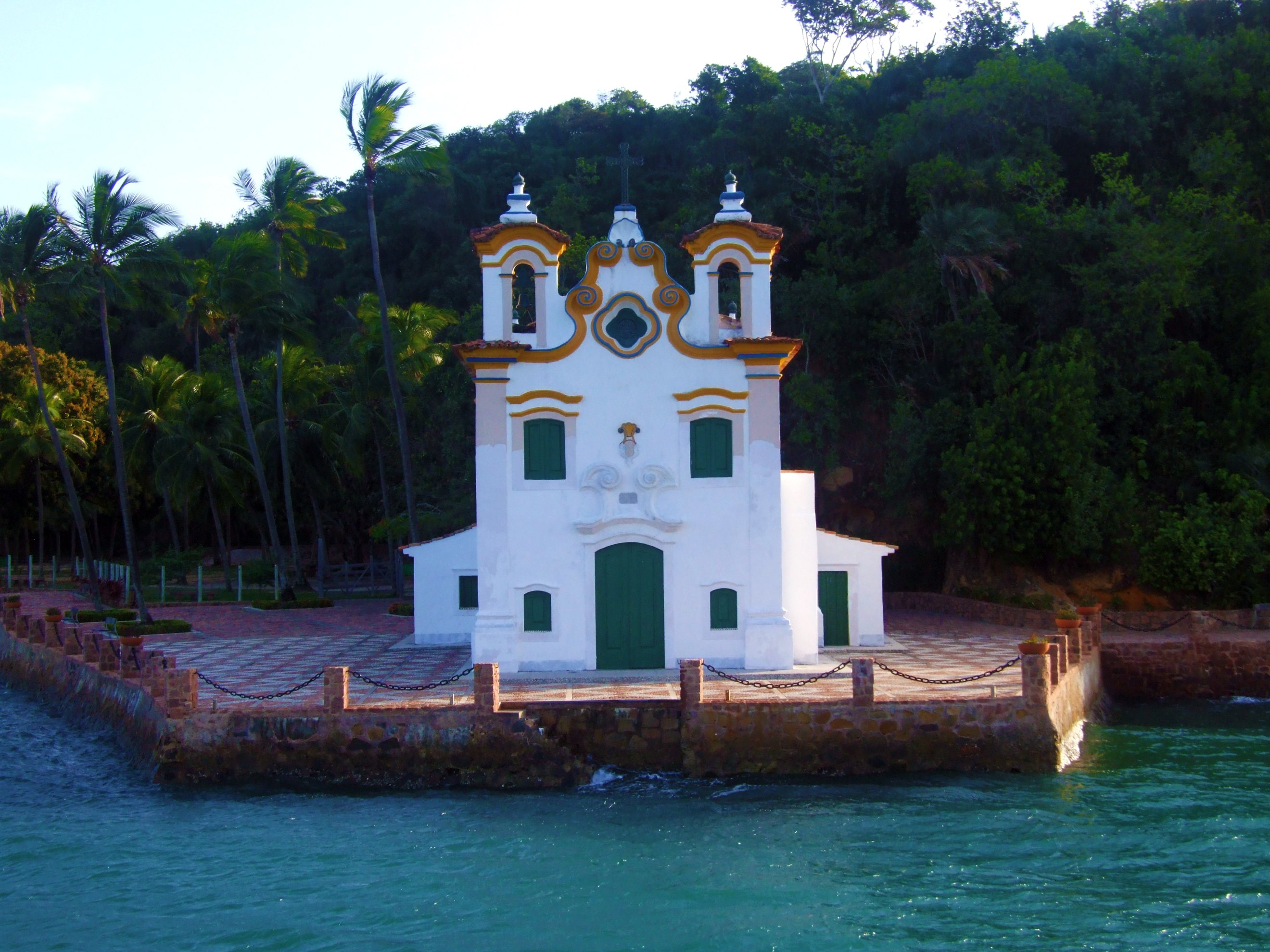 Igreja de Nossa Senhora do Loreto. Construída entre1640 e 1645. Localizada na Ponta do Loreto, Ilha dos Frades - Bahia. A Ilha dos Frades é também uma das mais importantes do ponto de vista paisagístico. Dona de exuberante floresta atlântica, conta com inúmeras árvores nativas, inclusive pau-brasil. Seus primitivos habitantes foram os índios Tupinambás, que a defendiam dos colonizadores. Segundo alguns historiadores, o nome de Frades perpetua a memória de religiosos que, depois de um naufrágio, conseguiram chegar à ilha, onde foram devorados pelos Tupinambás. Em toda parte há vestígios históricos dos jesuítas, que foram donos da ilha e a venderam pouco antes da expulsão decretada pelo Marquês de Pombal e do início de uma ocupação econômica, com base em sesmarias doadas a fidalgos. Na Ilha dos Frades estão as ruínas de um lazareto, um armazém onde os escravos chegados ficavam de quarentena, de um entreposto onde os escravos engordavam antes de serem vendidos, de uma casa de farinha, além de duas igrejas: a de Nossa Senhora do Loreto e a de Nossa Senhora de Guadalupe. A primeira, localizada na Ponta do Loreto, foi construída entre 1640 e 1645. É um dos locais mais belos da ilha, com uma pequena enseada, onde a mata beira o mar. A praia é das mais belas, porém o declive é abrupto para o "boqueirão", a parte mais funda da Baía de Todos os Santos. Fonte